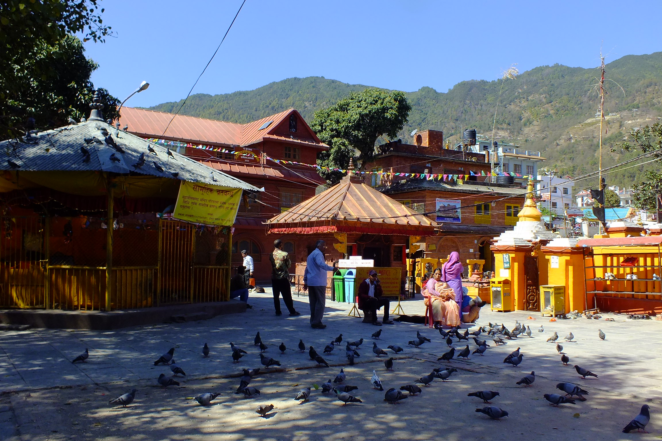 2015-3 Budhanilkantha,Nepal ブダニールカンタ寺院